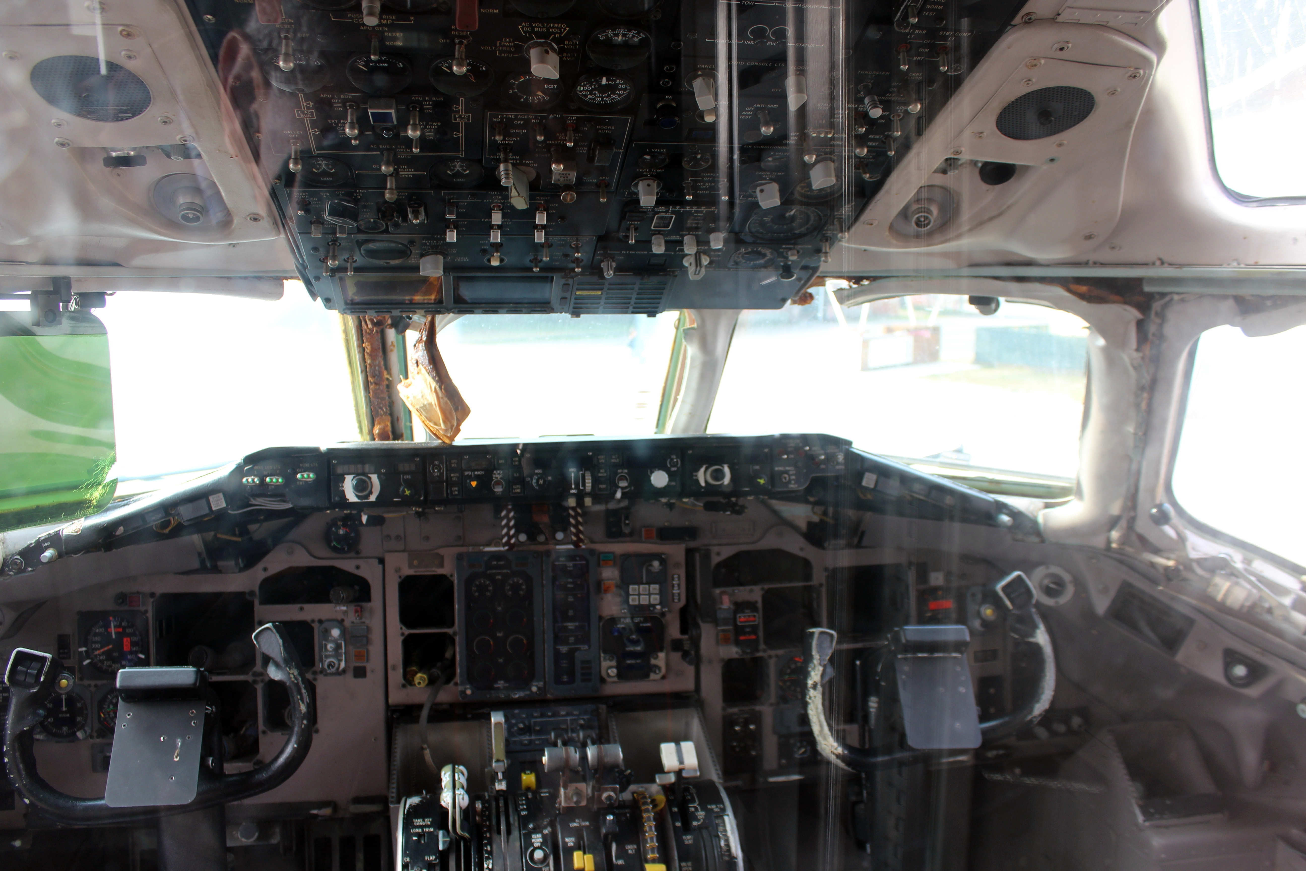 cabina di pilotaggio dc9 Presidenziale